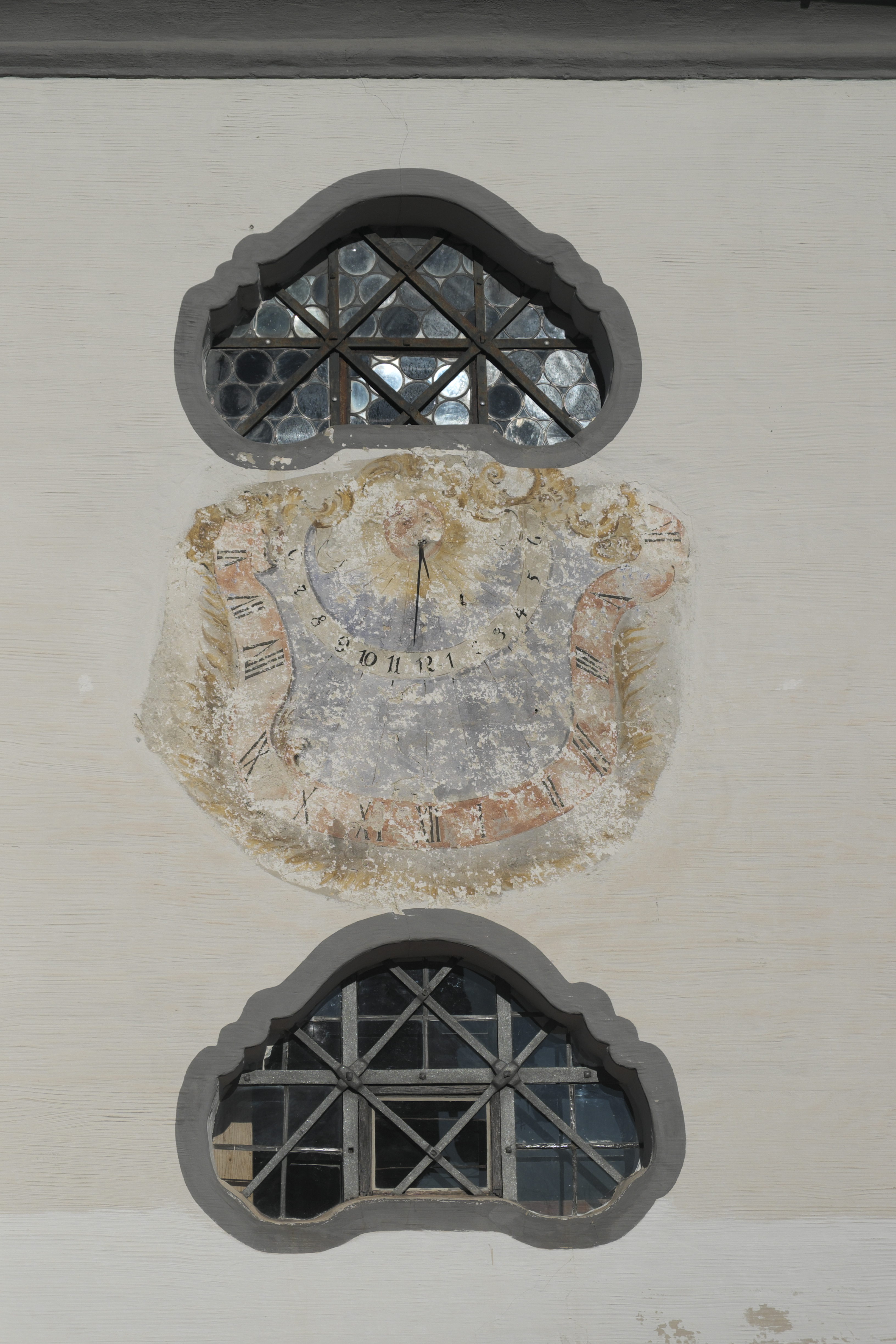 Katholische Pfarrkirche St. Martin in Thaining im oberbayerischen Landkreis Landsberg am Lech (Bayern/Deutschland), Sonnenuhr